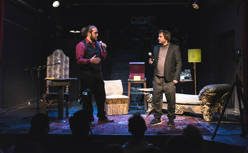 Heinrich Himalaya & David Scheid, Ateliertheater Vienna, Dec. 2017